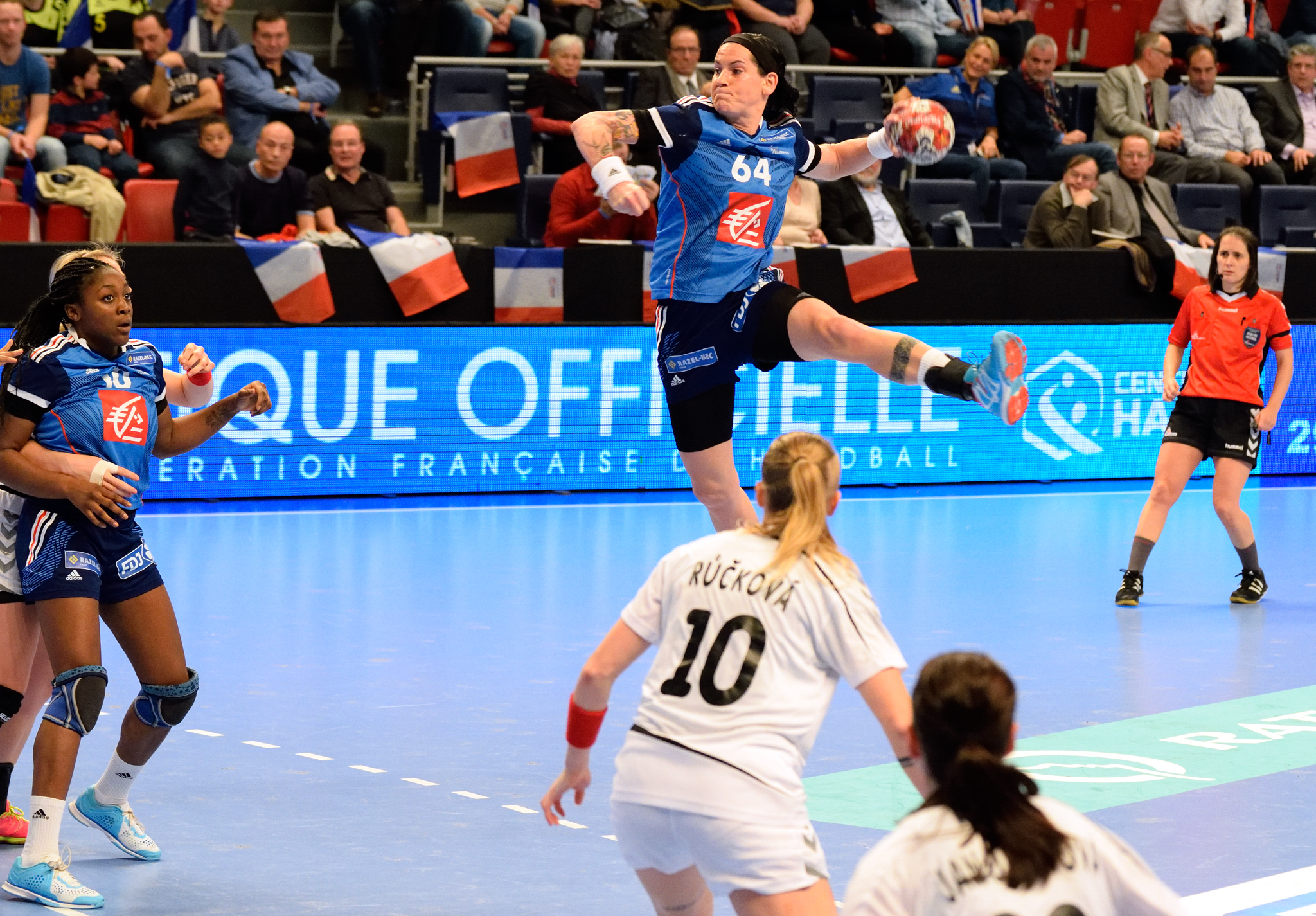 Alexandra Lacrabère Le 29 novembre 2015, lors du match France / République Tchèque pour le compte du TIPIFF 2015. Au stade Pierre de Coubertin à Paris.